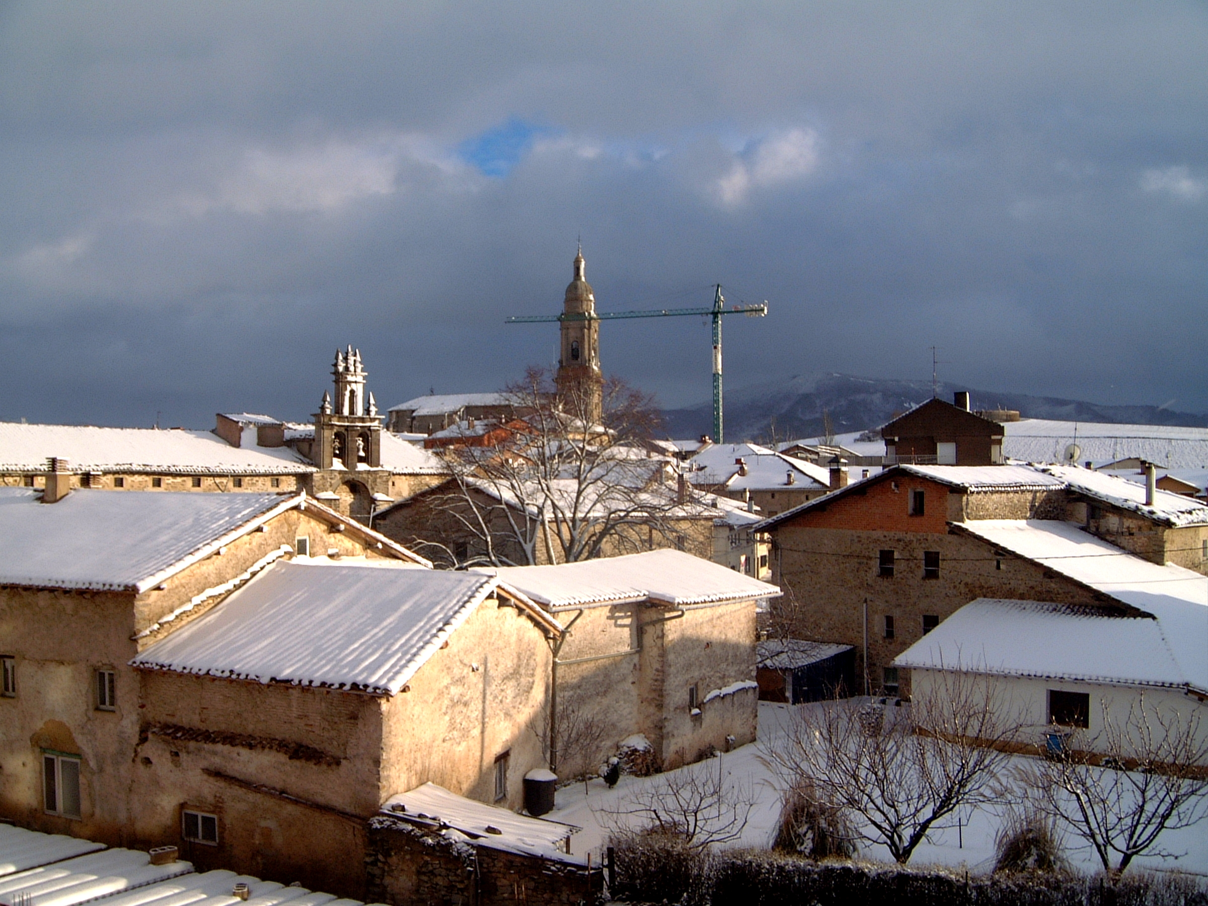 Alegría de Álava (Álava, Spain) after a snowfall